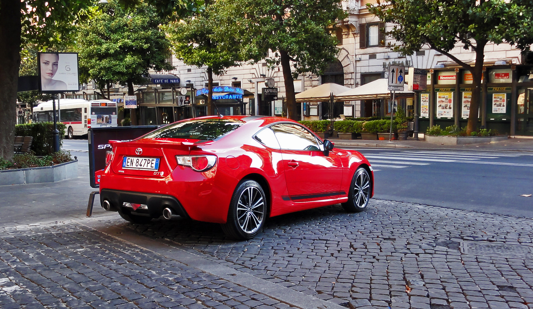 La prima versione speciale limitate della Toyota GT 86 ver. 2012 - 1st Edition prodotta in soli 86 esemplari. Roma, Via Veneto.